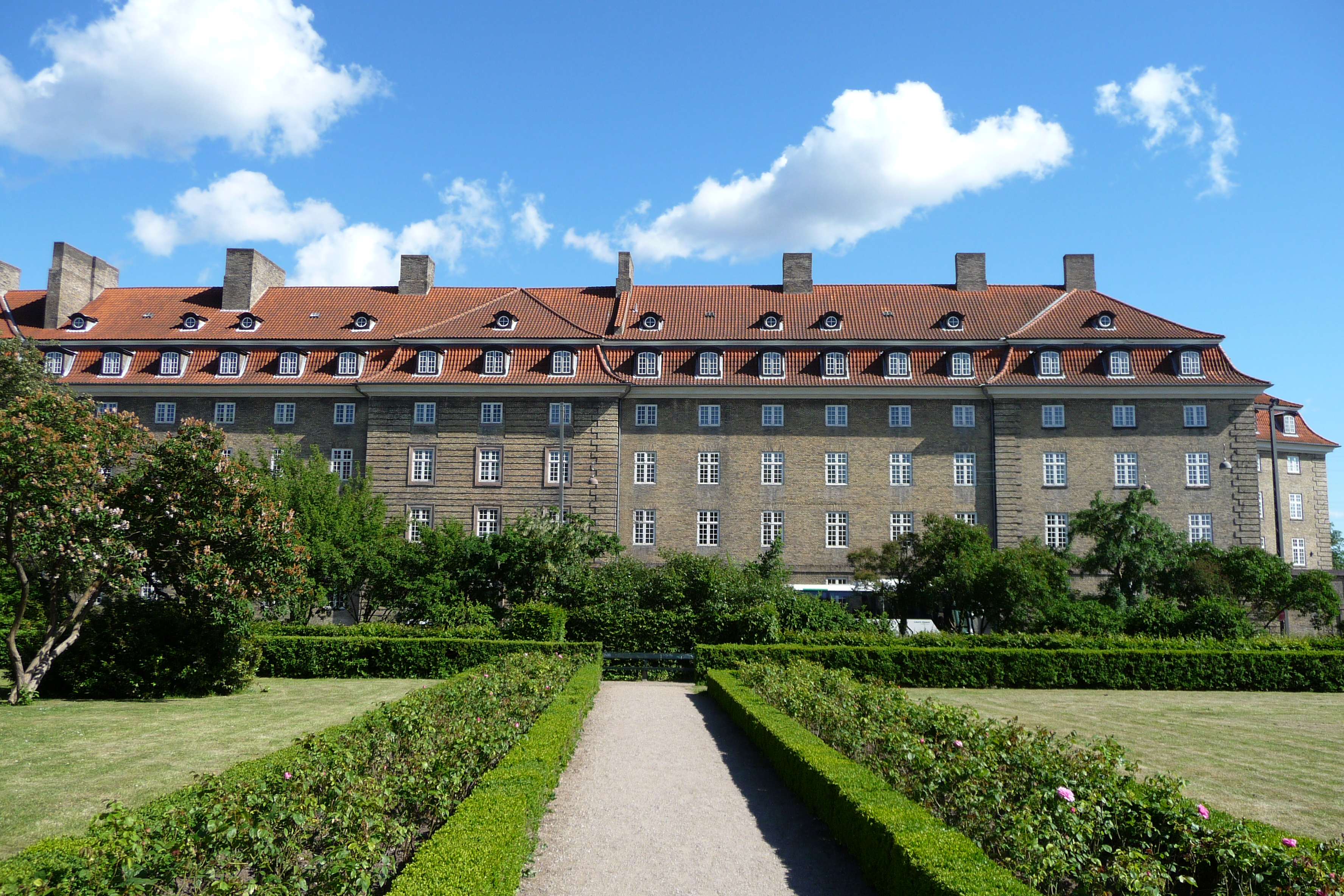 The former Sølvgade Barracks at Sølvgade in Copenhagen, Denmark, seen from Østre Anlæg